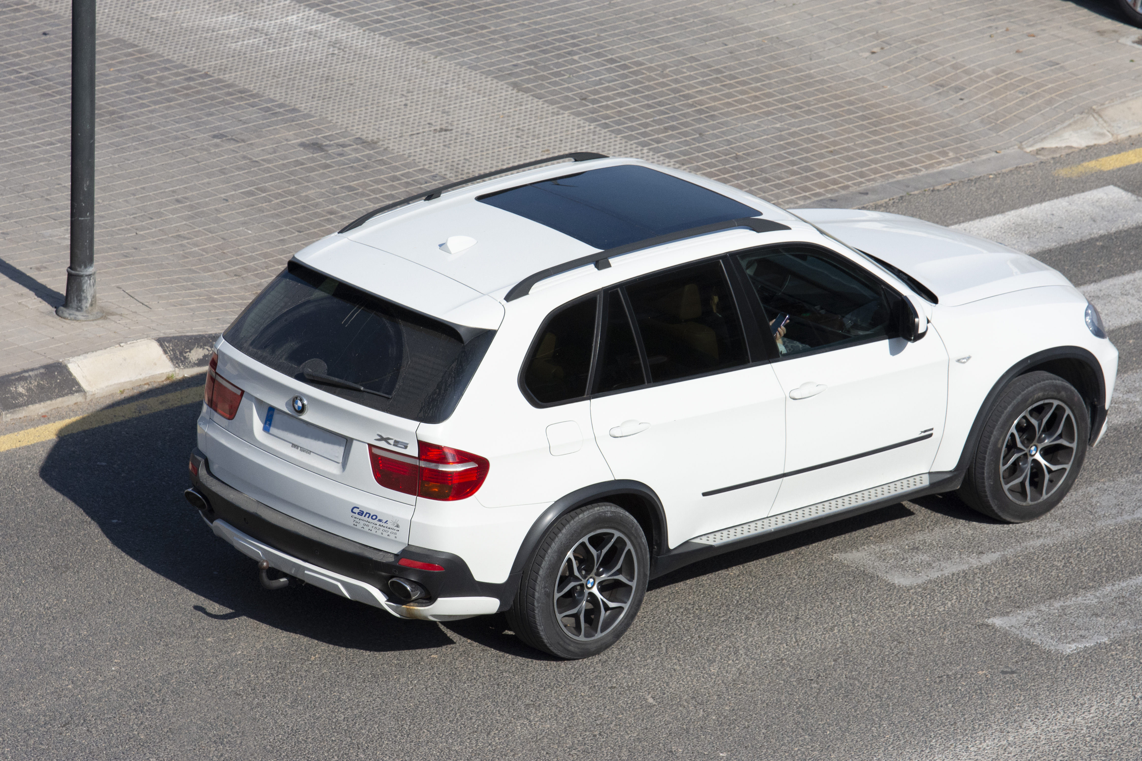 BMW X5 (E70) en Valencia.